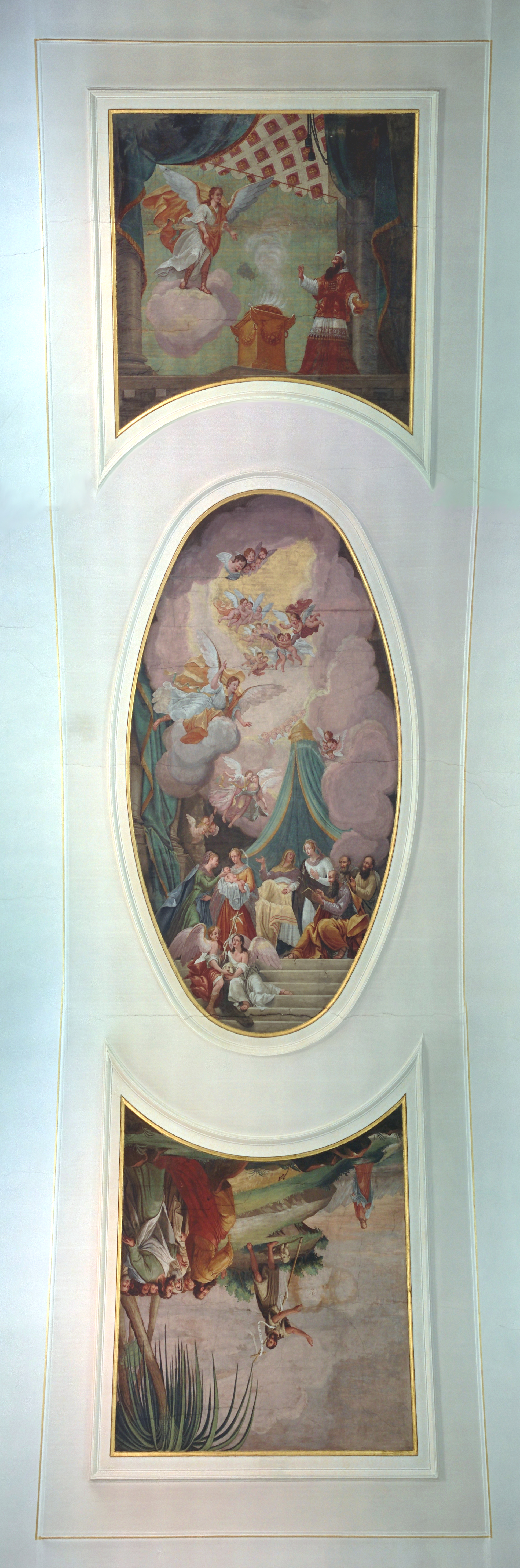 Affreschi nel soffitto della chiesa di San Giovanni Battista a Caldogno, in provincia di Vicenza. In tutto sono quattro e questi primi tre rappresentano (dall'alto verso il basso): l'annunciazione a Zaccaria della nascita del figlio, la nascita di san Giovanni Battista e la figura del santo.